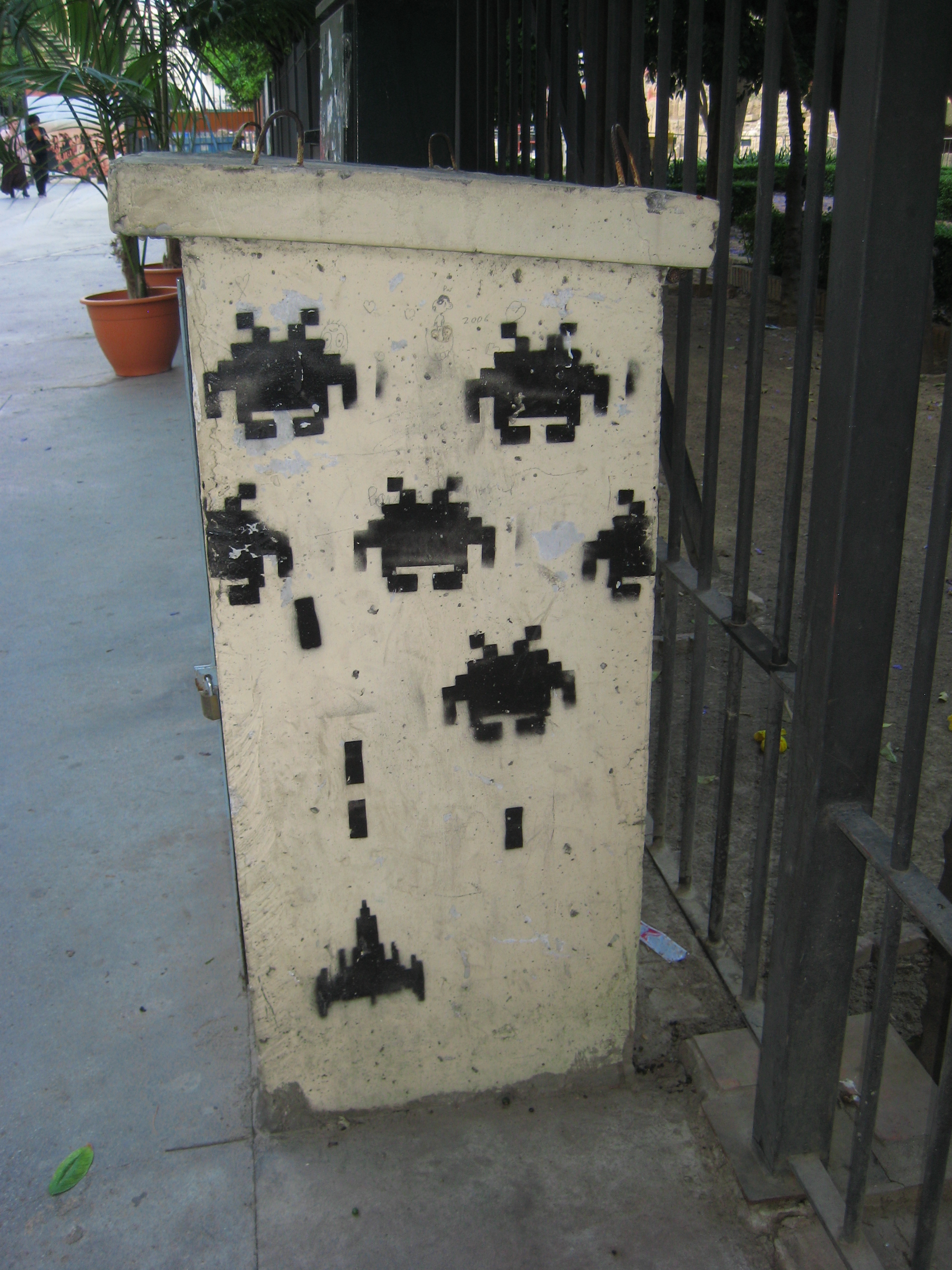 Junto al teatro romano de Málaga.